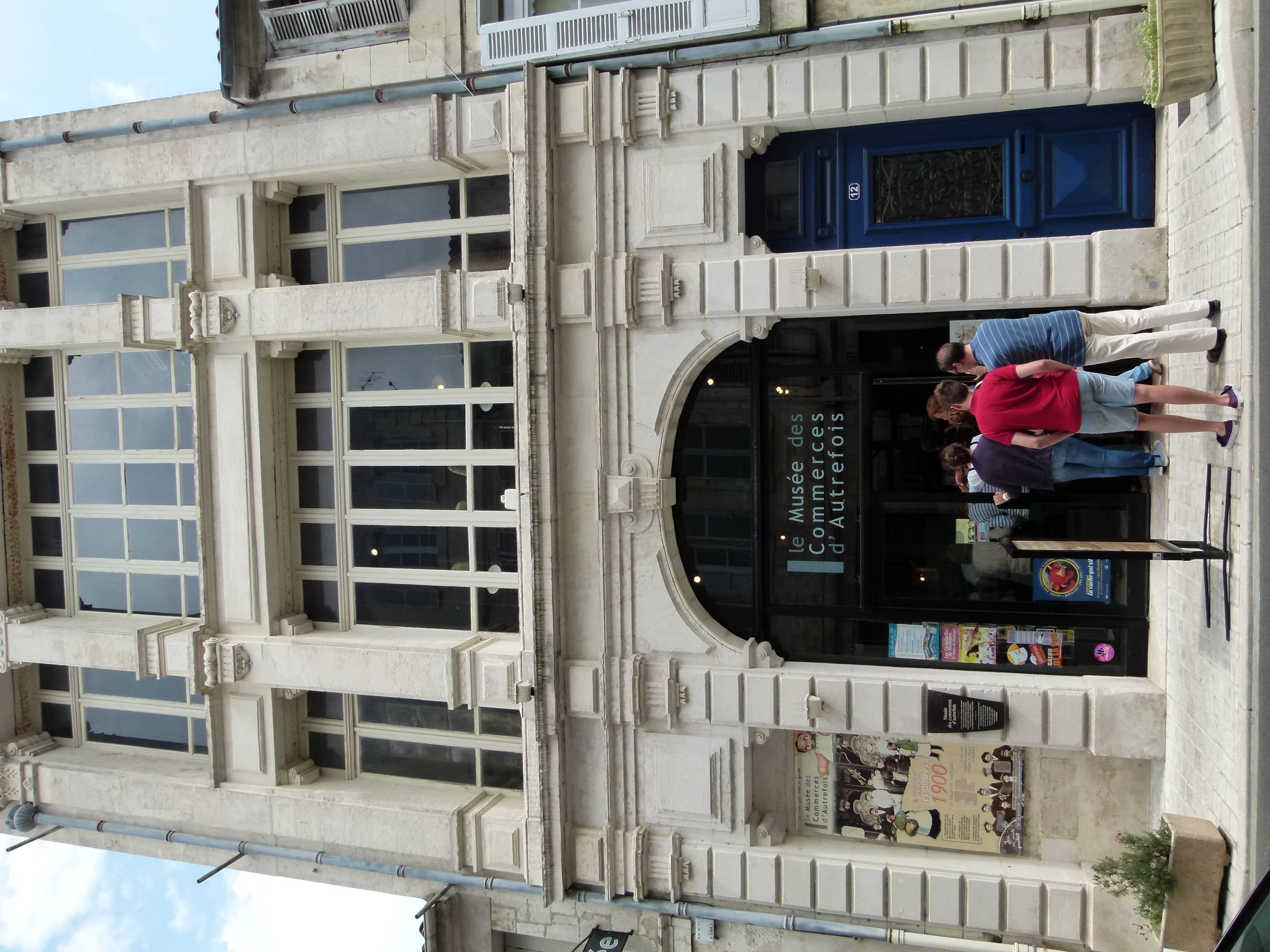 Façade du Musée des Commerces d'Autrefois à Rochefort en Charente-Maritime.